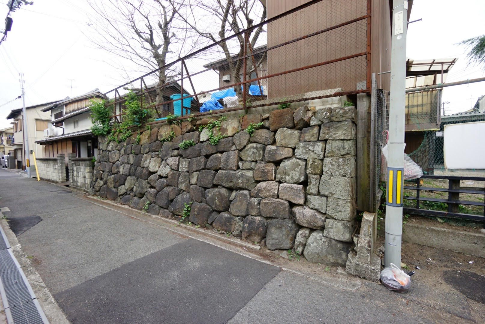 岸和田城の防潮石垣